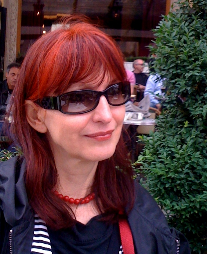 Grażyna Wojcieszko, promocja - La Maison de la Poésie et de la Langue française